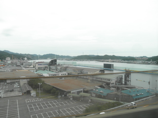 鳴門競艇場